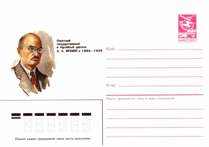 Художественные маркированные конверты 1984 года.